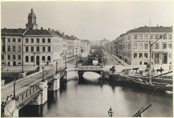 gata - avbildad Västra Hamngatan; Södra Hamngatan gata - utsikt från Norra Hamngatan 10 [Hamnstyrelsens hus, mot söder] plats - avbildad Stora Hamnkanalen; Västra Hamnkanalen; Kämpebron Till vänster: Kvarteret Kommerserådet Till höger: Kvarteret Alströmer